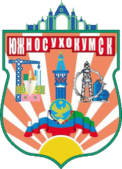 Герб города Южно-Сухокумск